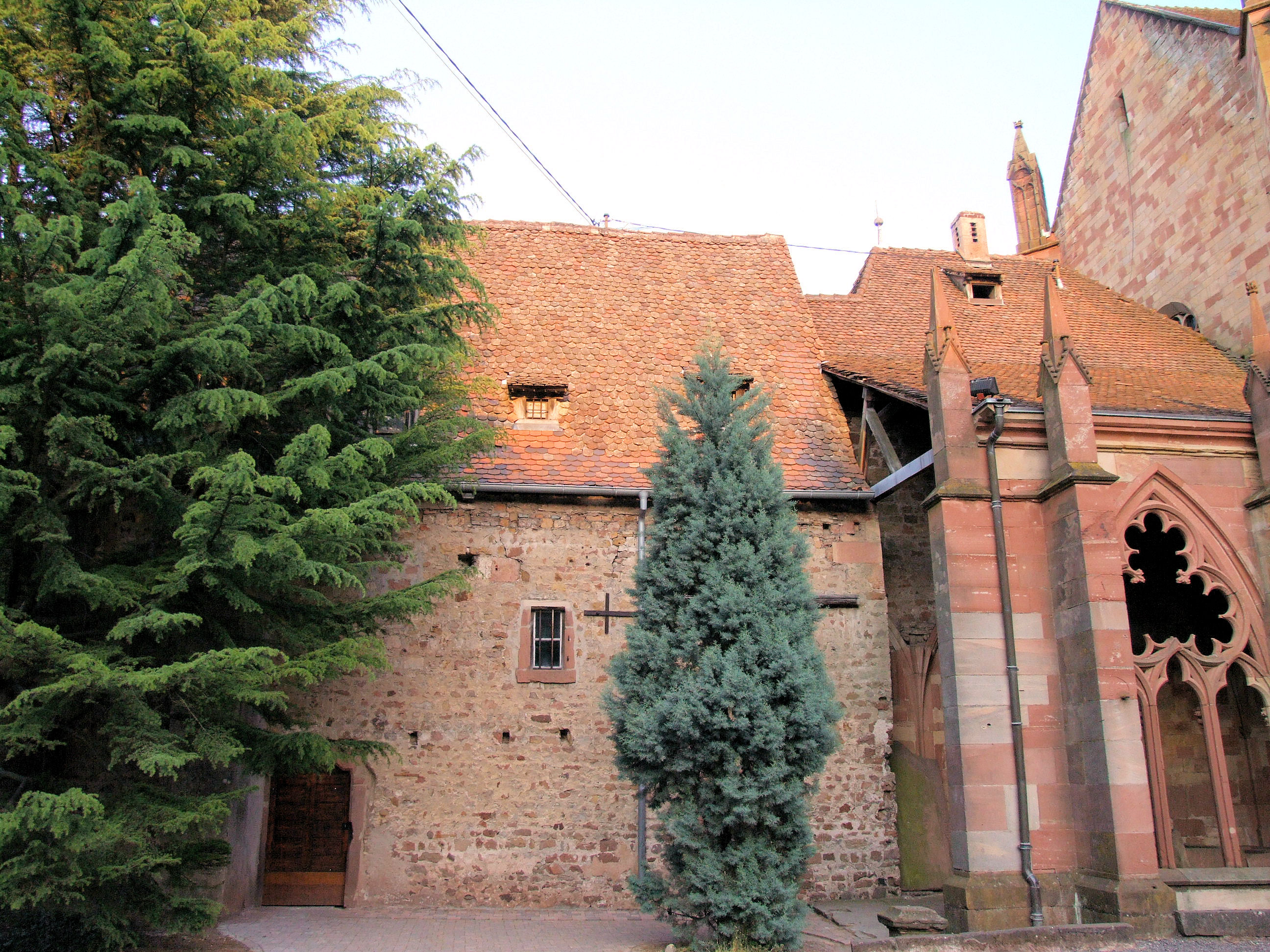 Wissembourg - Chapelle Saints-Pierre-et-Paul